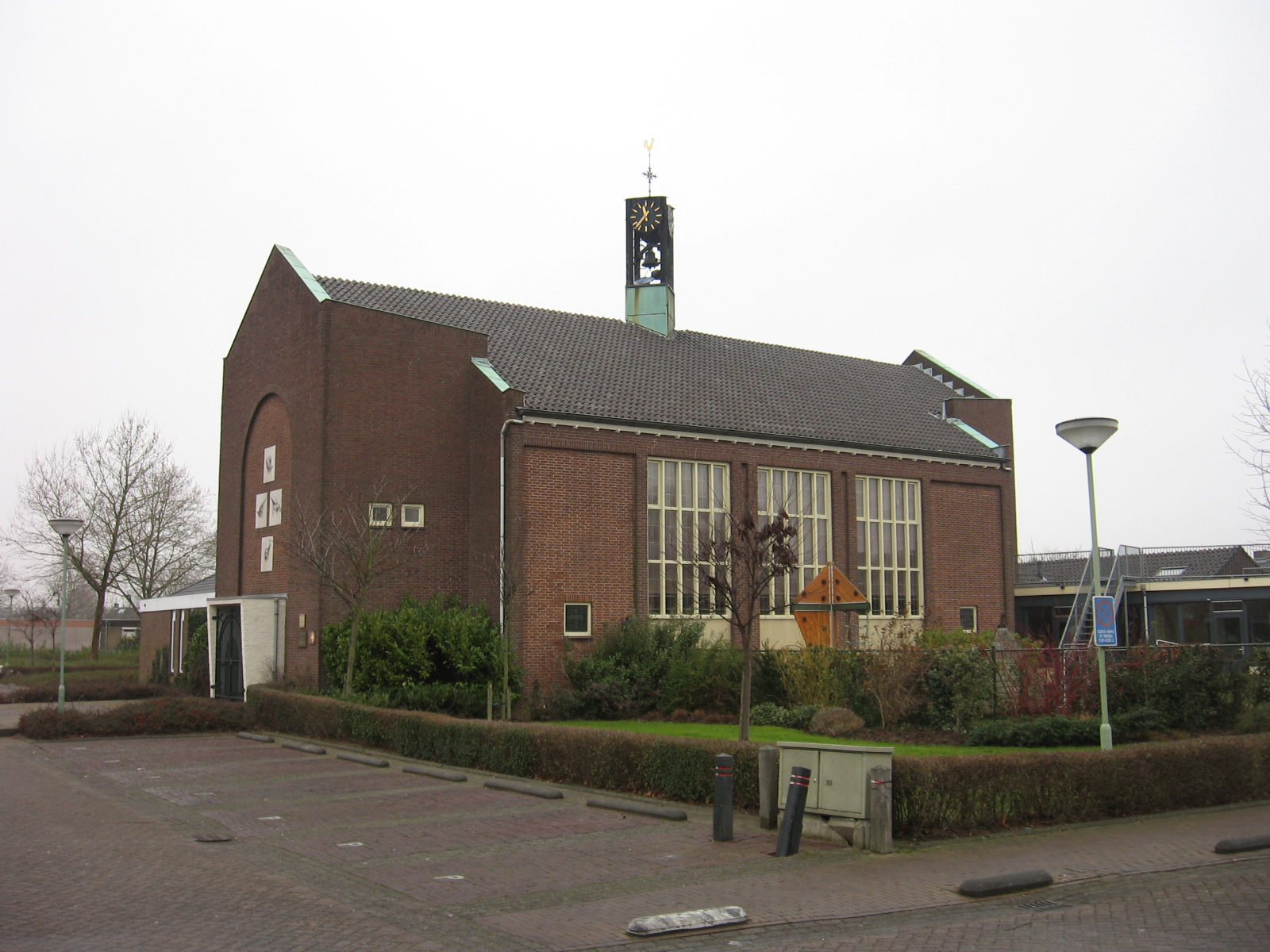 Sleeuwijk